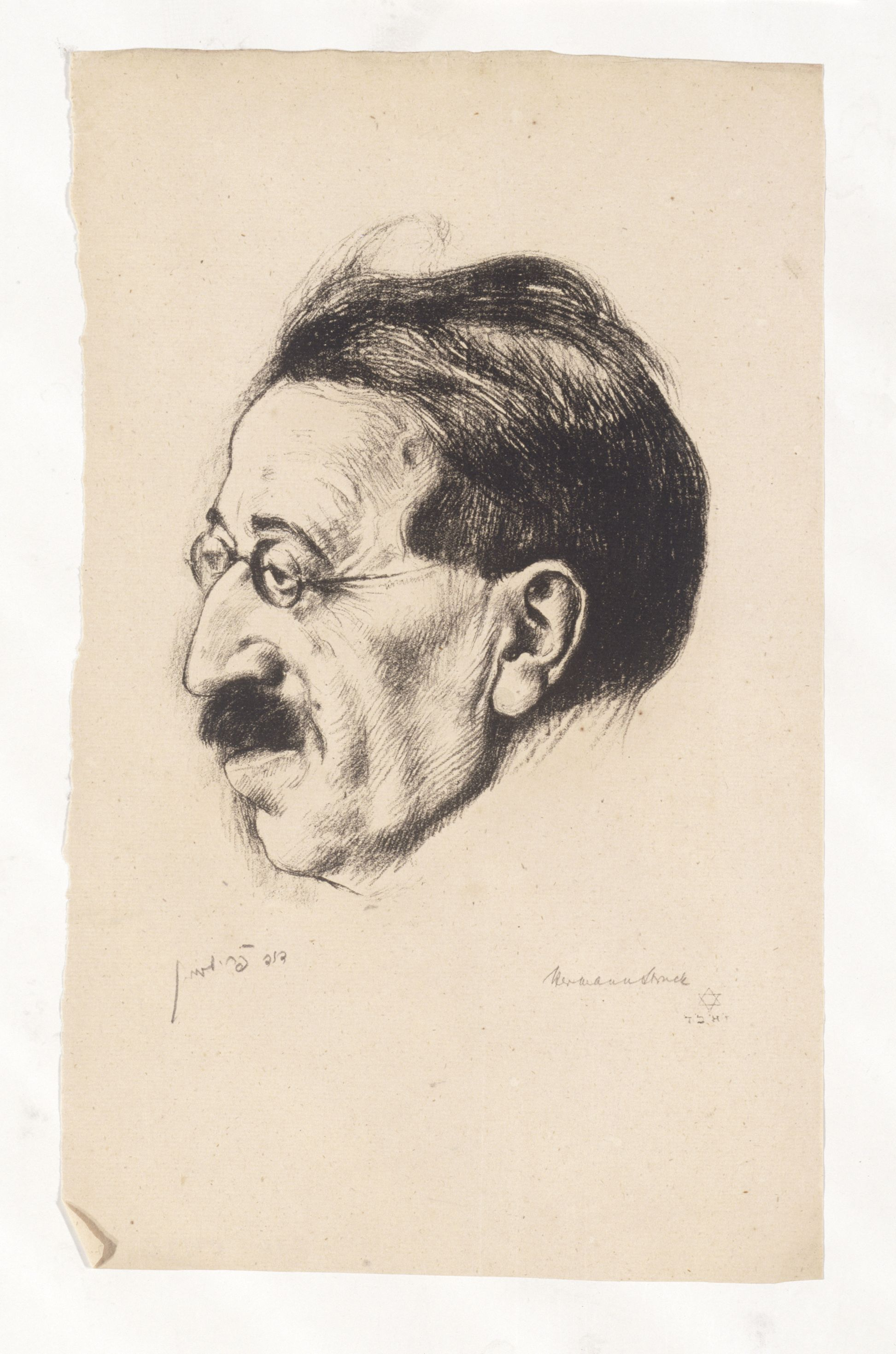 Artwork by Hermann Struck Dargestellte Person: Frischmann, David (1859 - 1922), DNB-Link Datierung Display: ca. 1920 - 1925 Objektart: Lithografie Schlagworte Inhalt /Geografie: Mann, Porträt, Brille Schlagworte Kontext: Schriftsteller